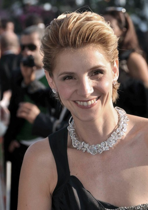 Clotilde Courau au festival de Cannes